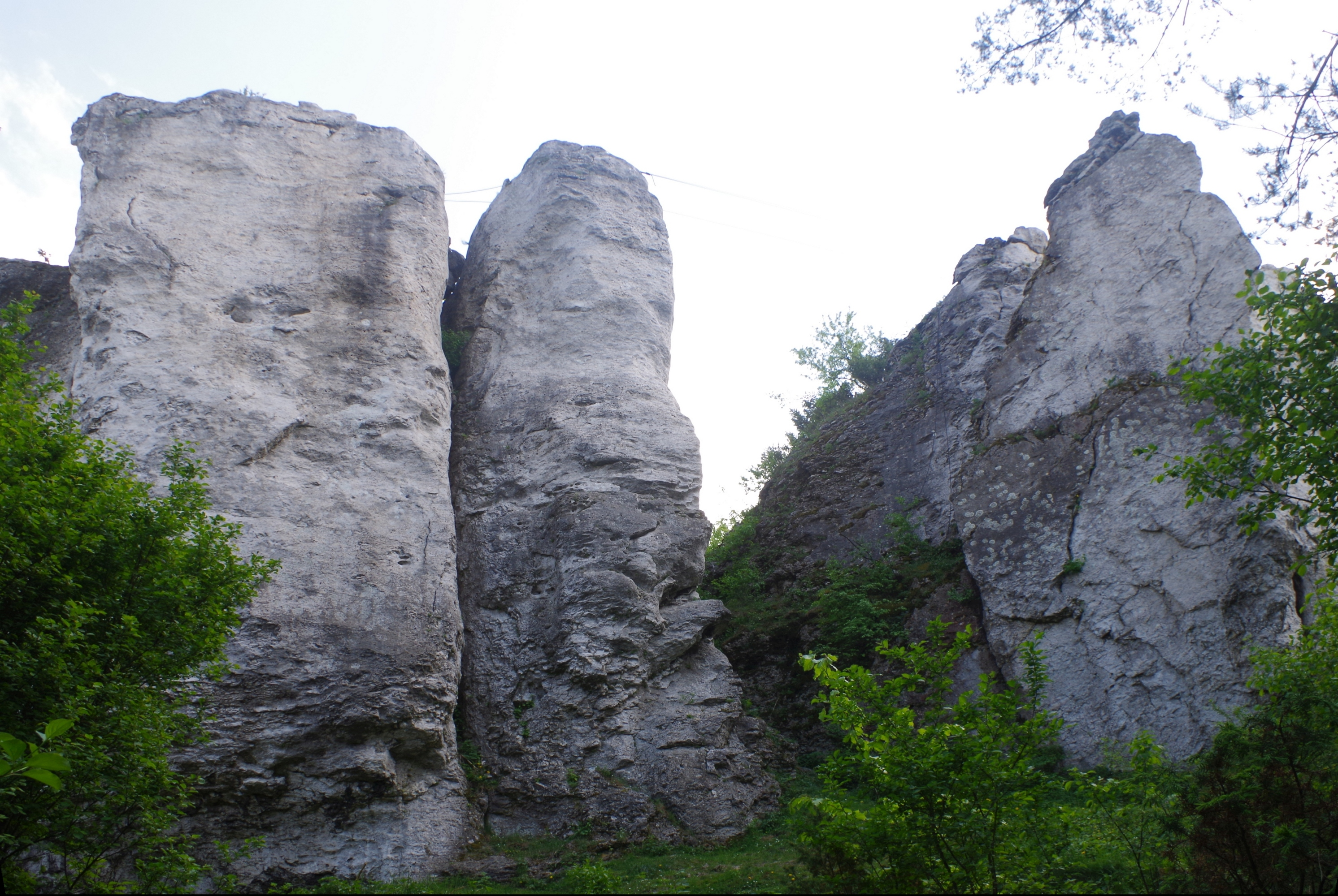 Skały Biblioteka w Podlesicach